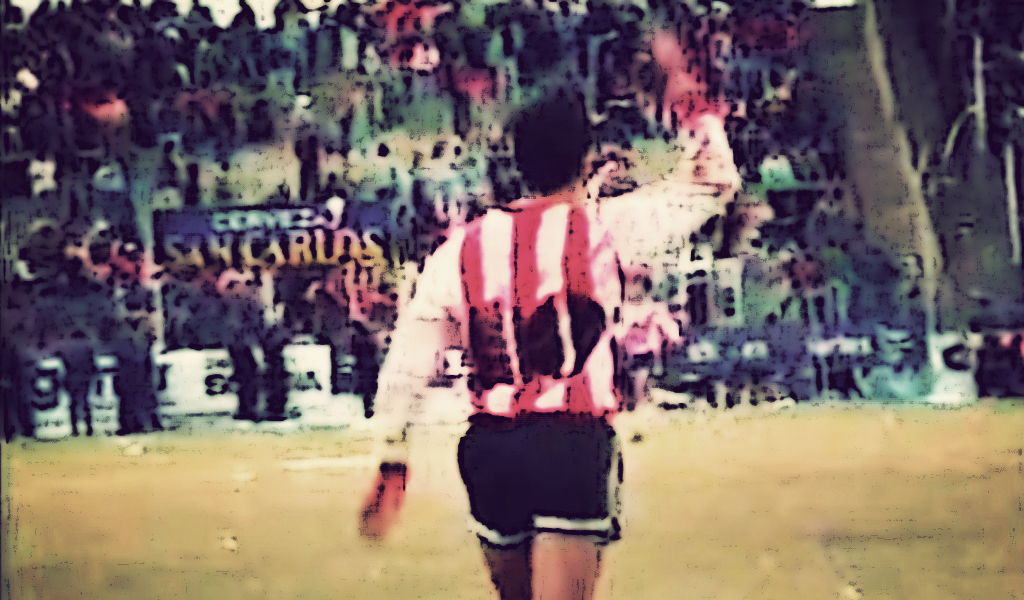 Leonardo Carlo Madelon